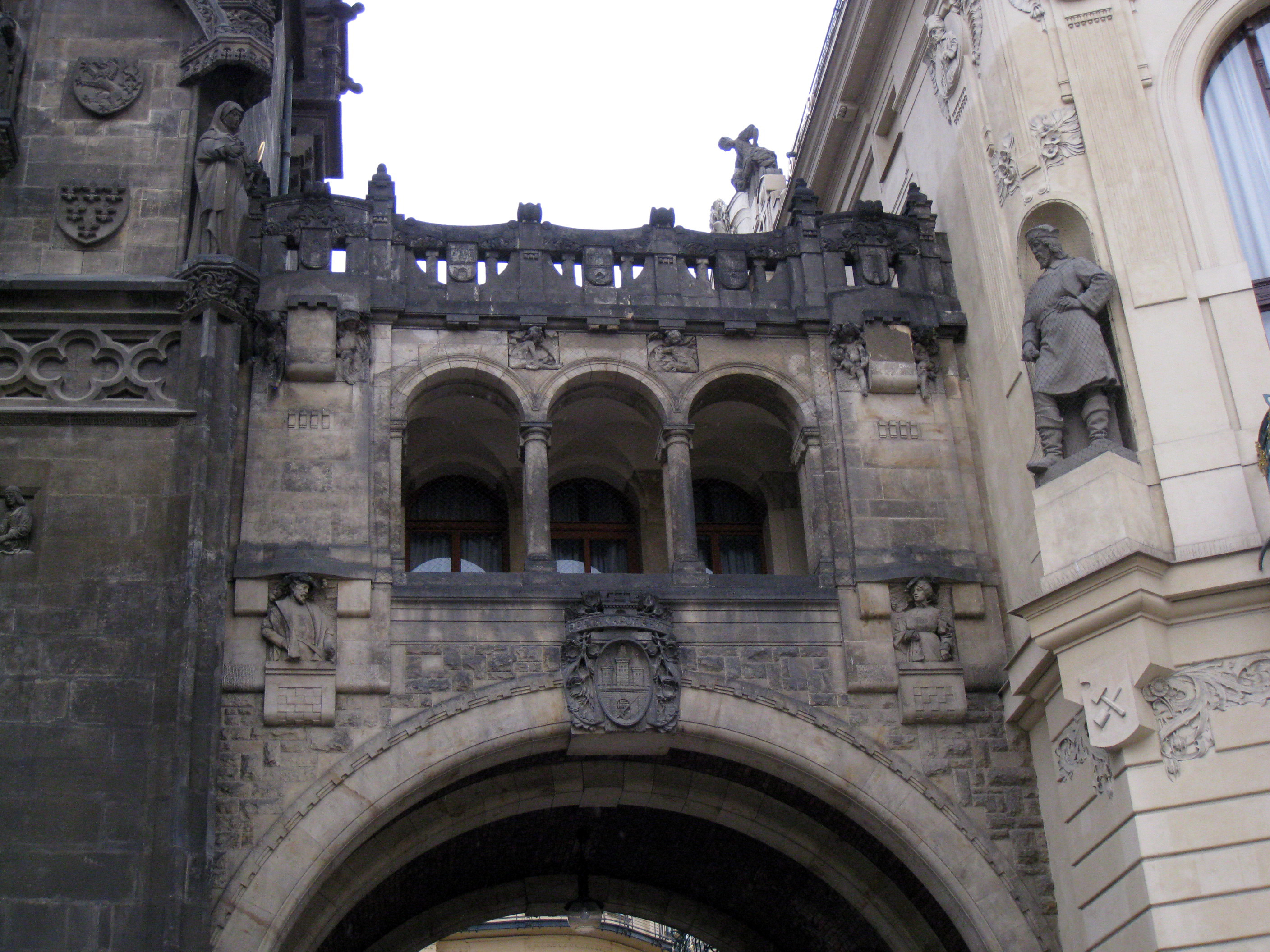 Městské opevnění - Prašná brána (Staré Město), Praha 1, Celetná, Na Příkopě, Staré Město